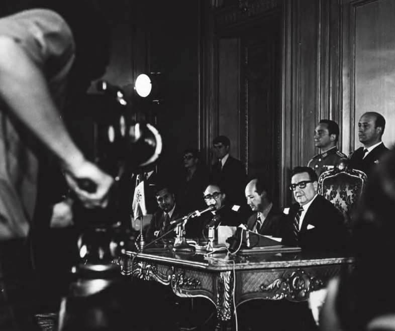 El Presidente Salvador Allende entrega el documento de la Nacionalizacion del Cobre. De pié: edecán Arturo Araya Peeters